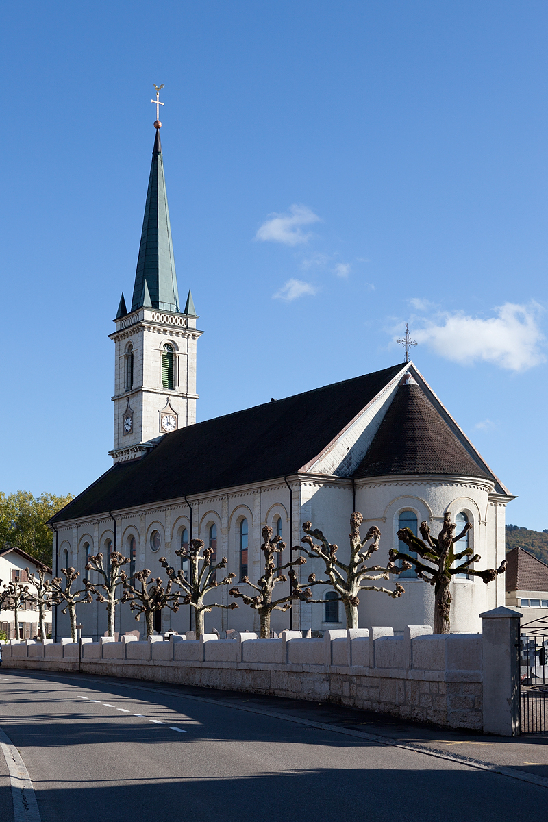 Kirche Notre-Dame-de-l'Assomption in Courgenay (JU)